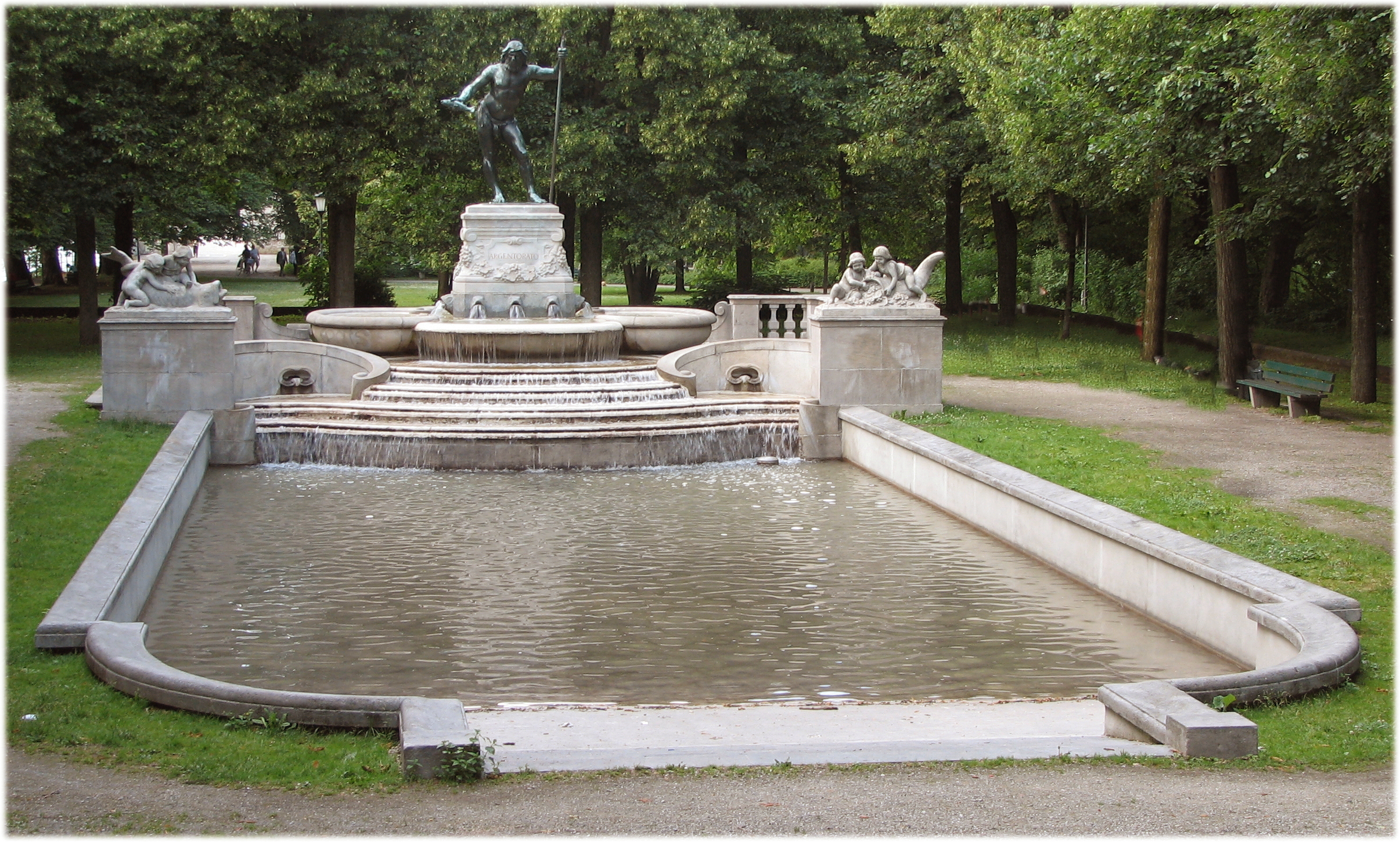 München, Vater-Rhein-Brunnen auf der Museumsinsel, eigene Aufnahme von Gerhard R. Schulze, Juni 2006